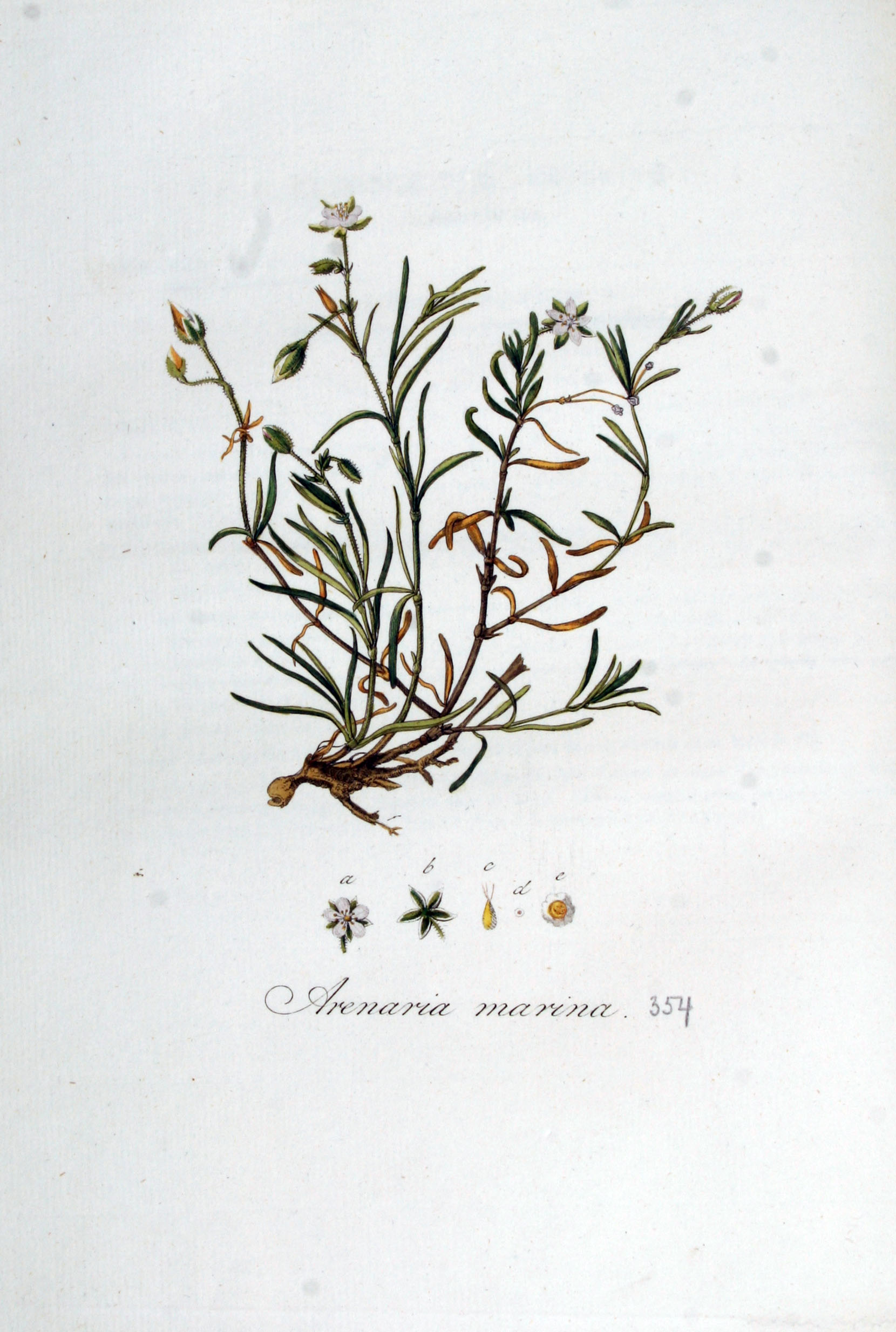 Spergularia media (L.) C. Presl (Syn. Arenaria marina Smith pro parte)